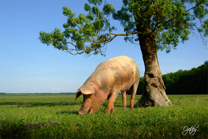 Svinja u Parku prirode "Lonjsko polje"